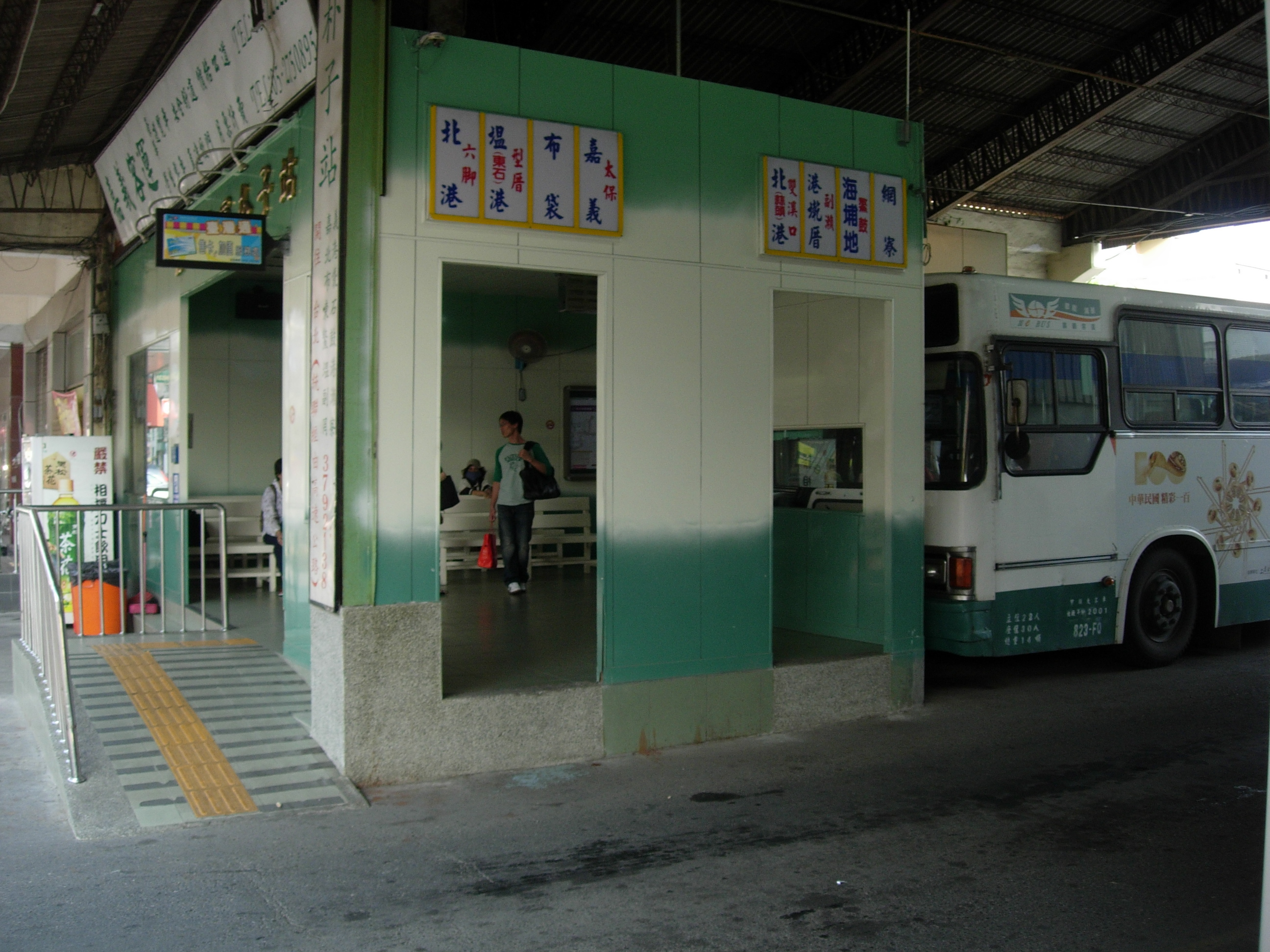 中文（台灣）: 朴子站月台